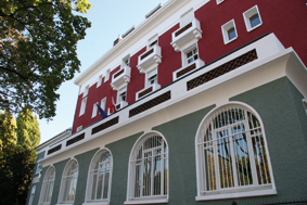 Maison des Etudiants Canadiens, Cité internationale universitaire de Paris